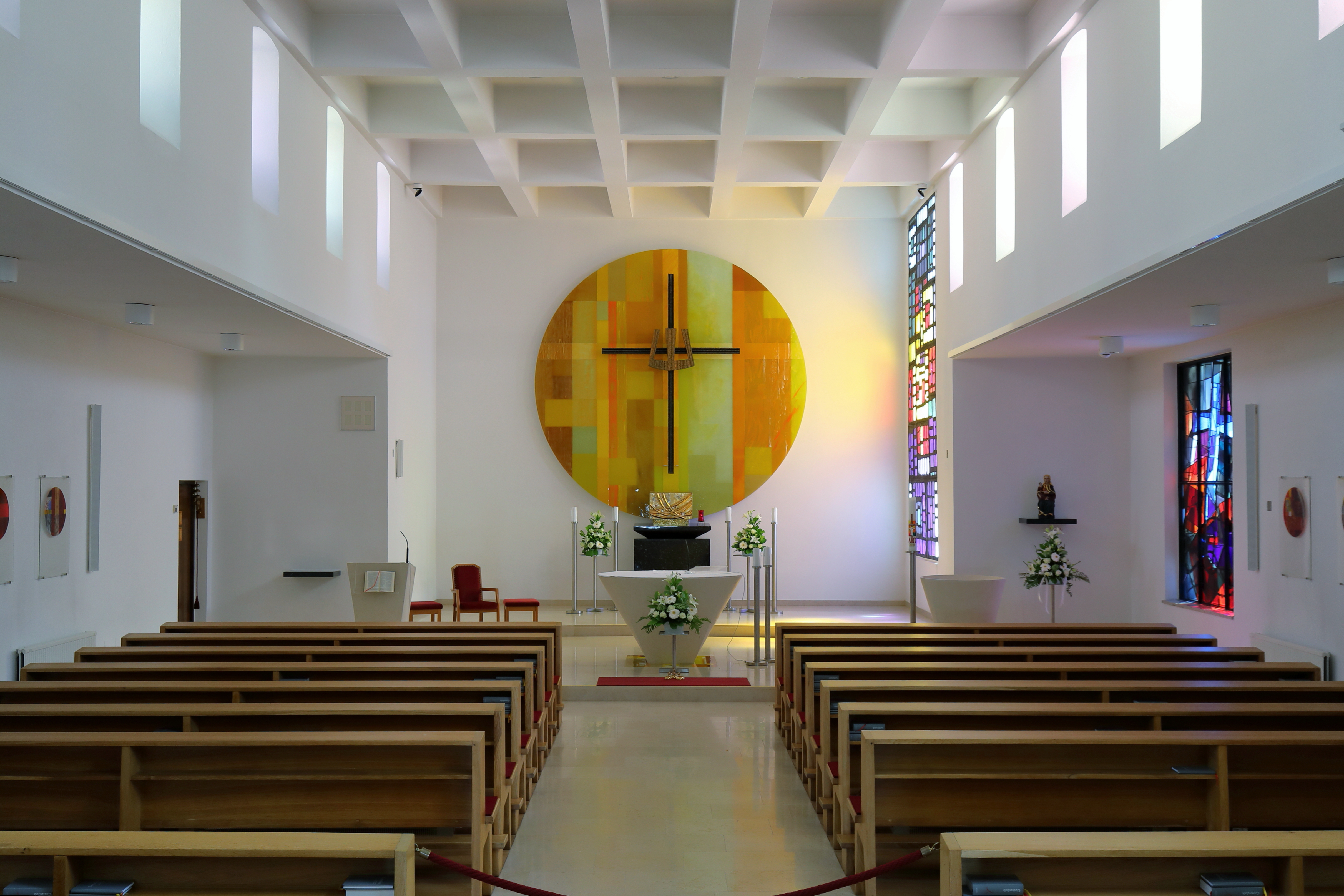 Innenansicht der röm.-kath. Pfarrkirche in der Mörbisch am See.Der Altarraum wurde von dem Künstler Heinz Ebner (* 1963) neu gestaltet und am 4. Adventsonntag 2015 von Diözesanbischof Ägidius Zsifkovics eingeweiht. Altar, Taufbecken und Ambo sind aus beigen Donaukalkstein und wurden vom Steinmetzmeister Kurt Schwarz gefertigt. Die kreisrunde Scheibe an der Altarwand ist aus Fusingglas, teilweise bemalt und hat einen Durchmesser von rd. 4 m.